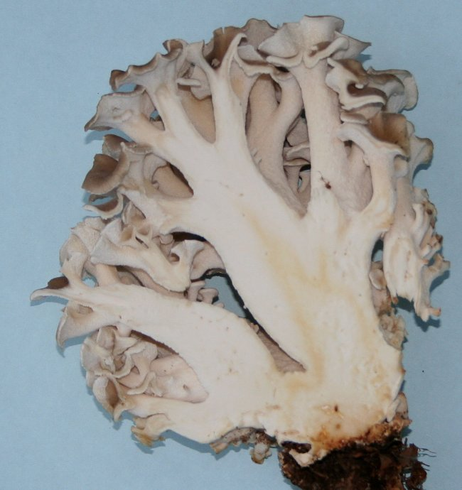 Polyporus umbellatus Bucey_lès-Gy 70700 France